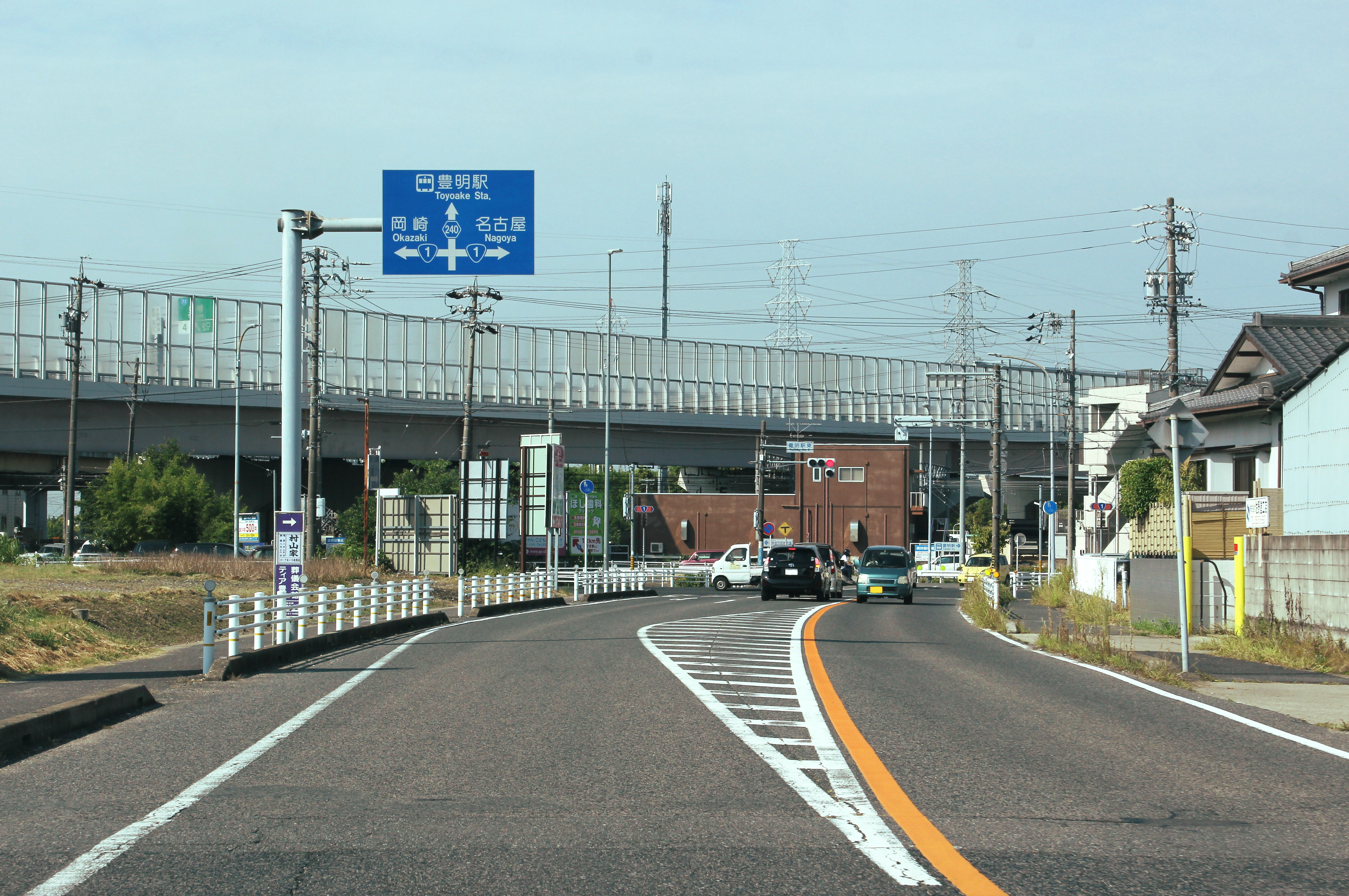 愛知県道220号起点の豊明駅東交差点